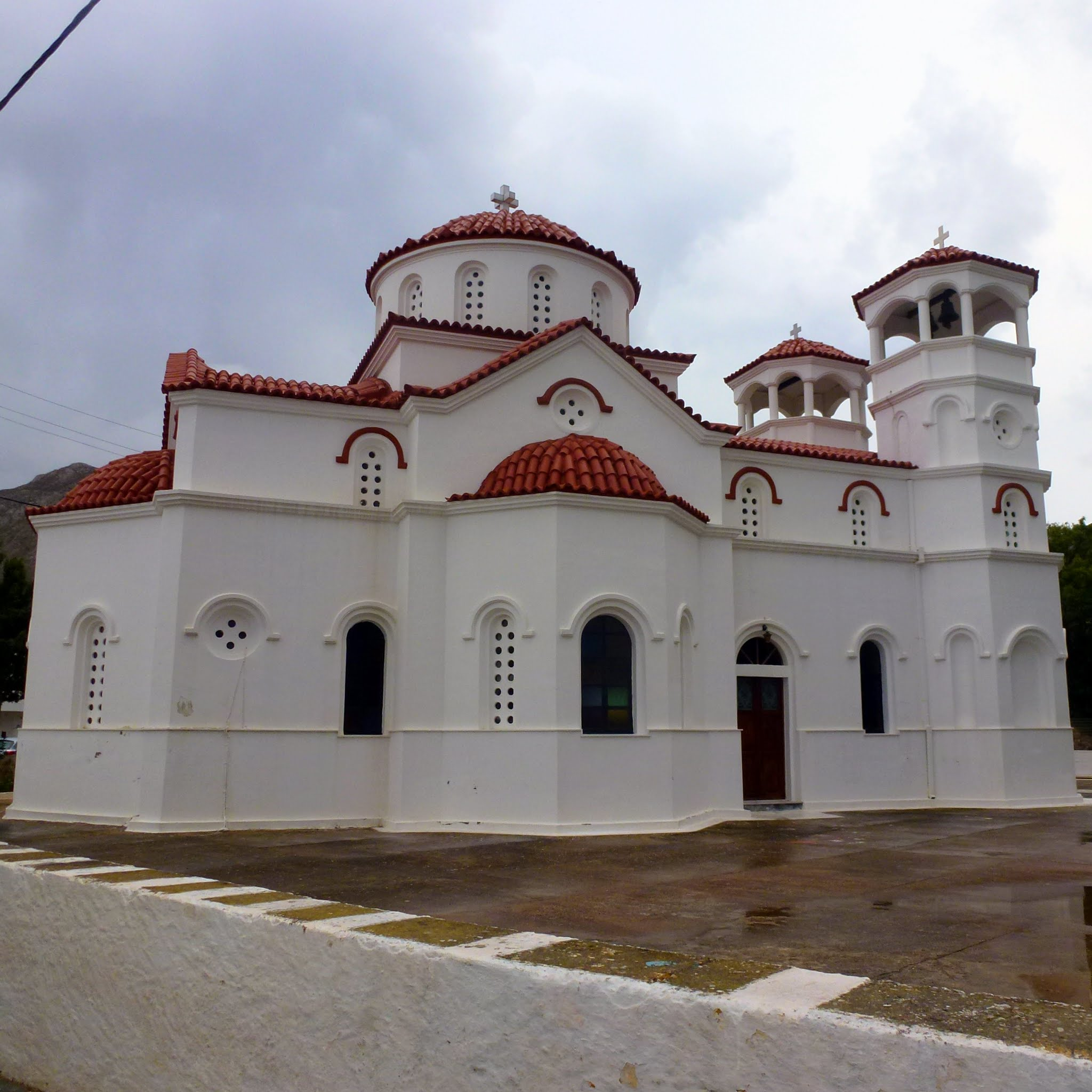 Tilos.Chiesa di Livadia